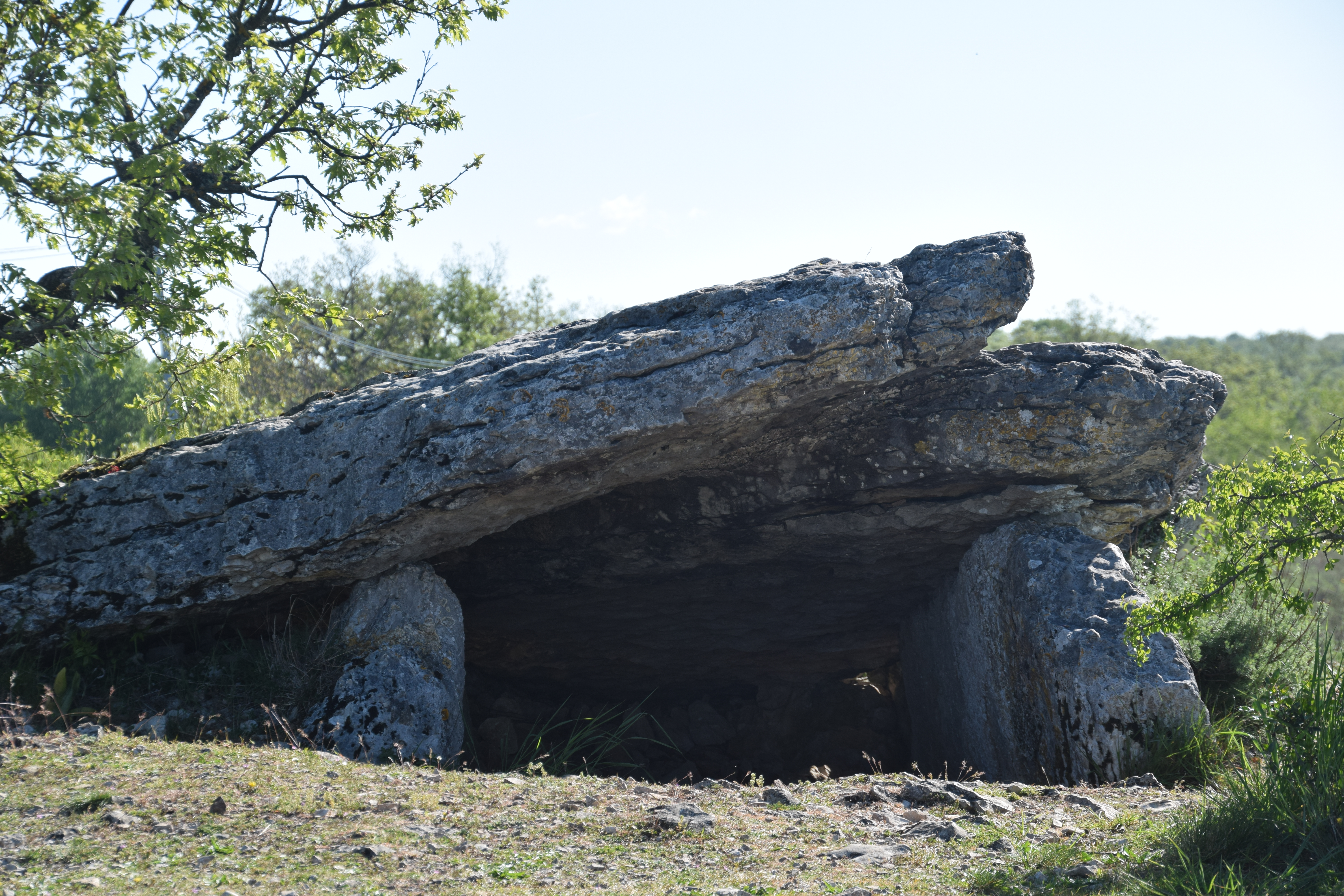 Néolithique dolmen sous tumulus, Rocamadour, Lot, France